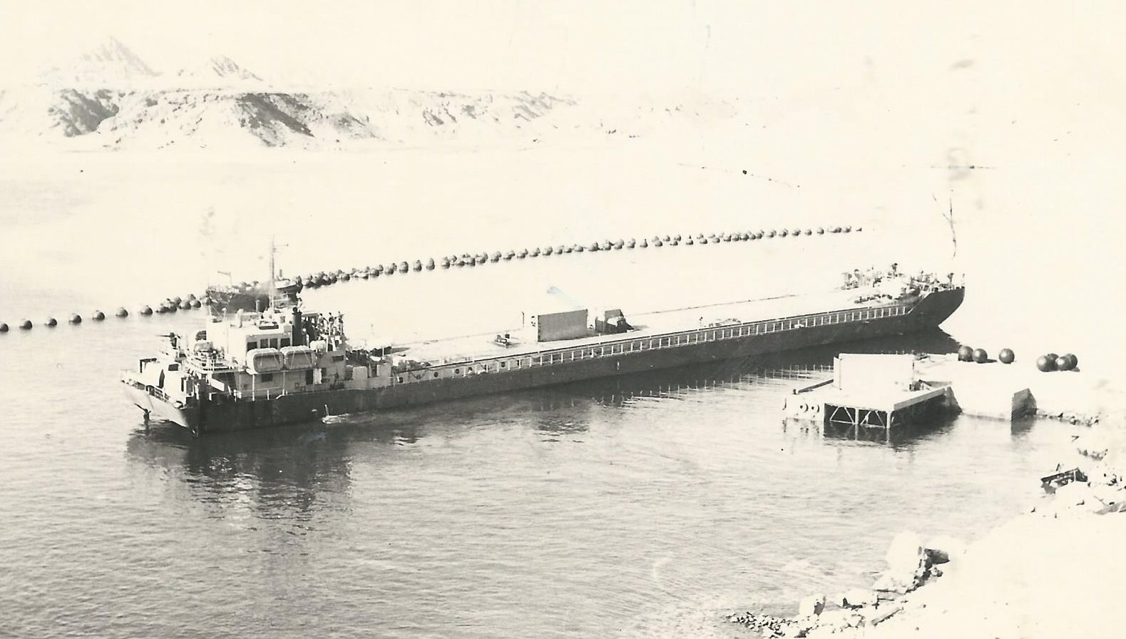 אח"י בת שבע עוגנת בנמל שארם א-שייח וסביבה רשת הגנה מפני צוללים.